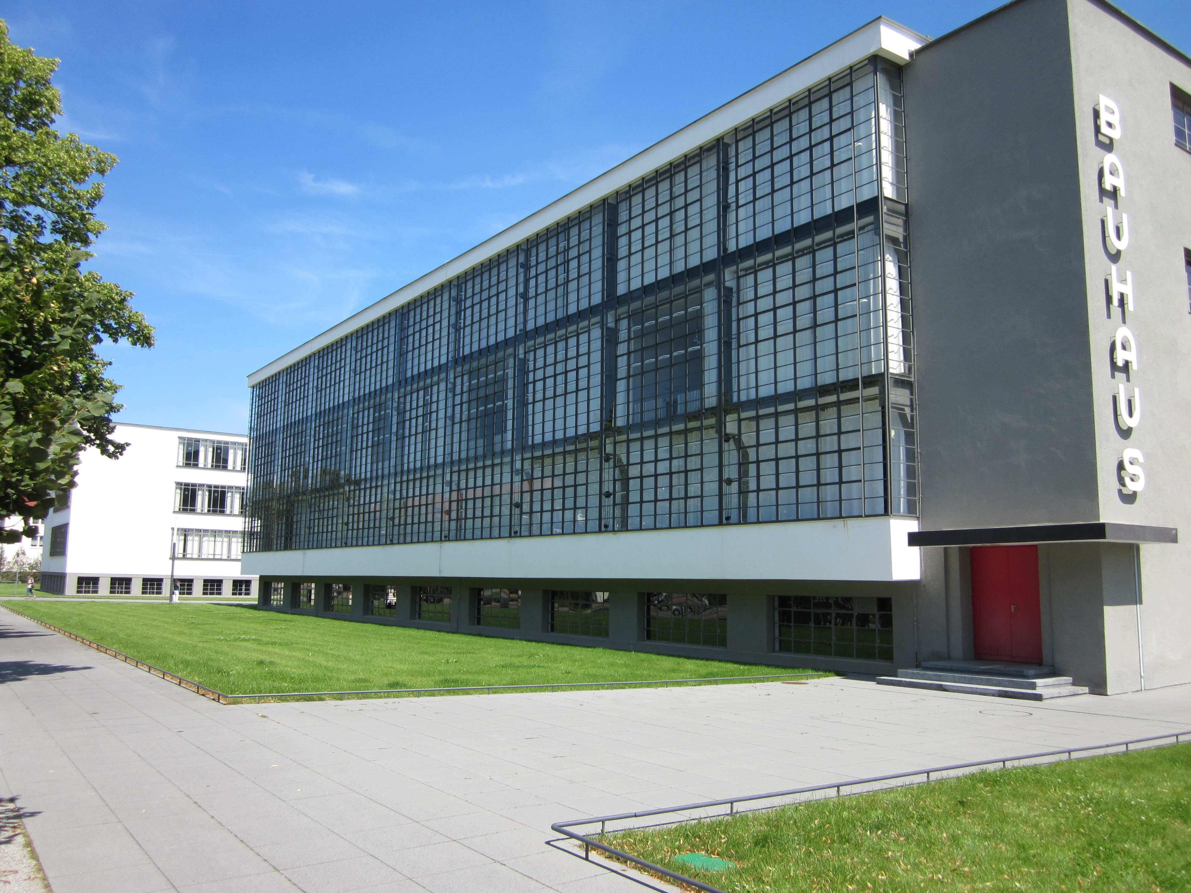 Das Bauhaus in Dessau; aufgenommen im Juli 2011 während einer Radtour von Magdeburg nach Prag